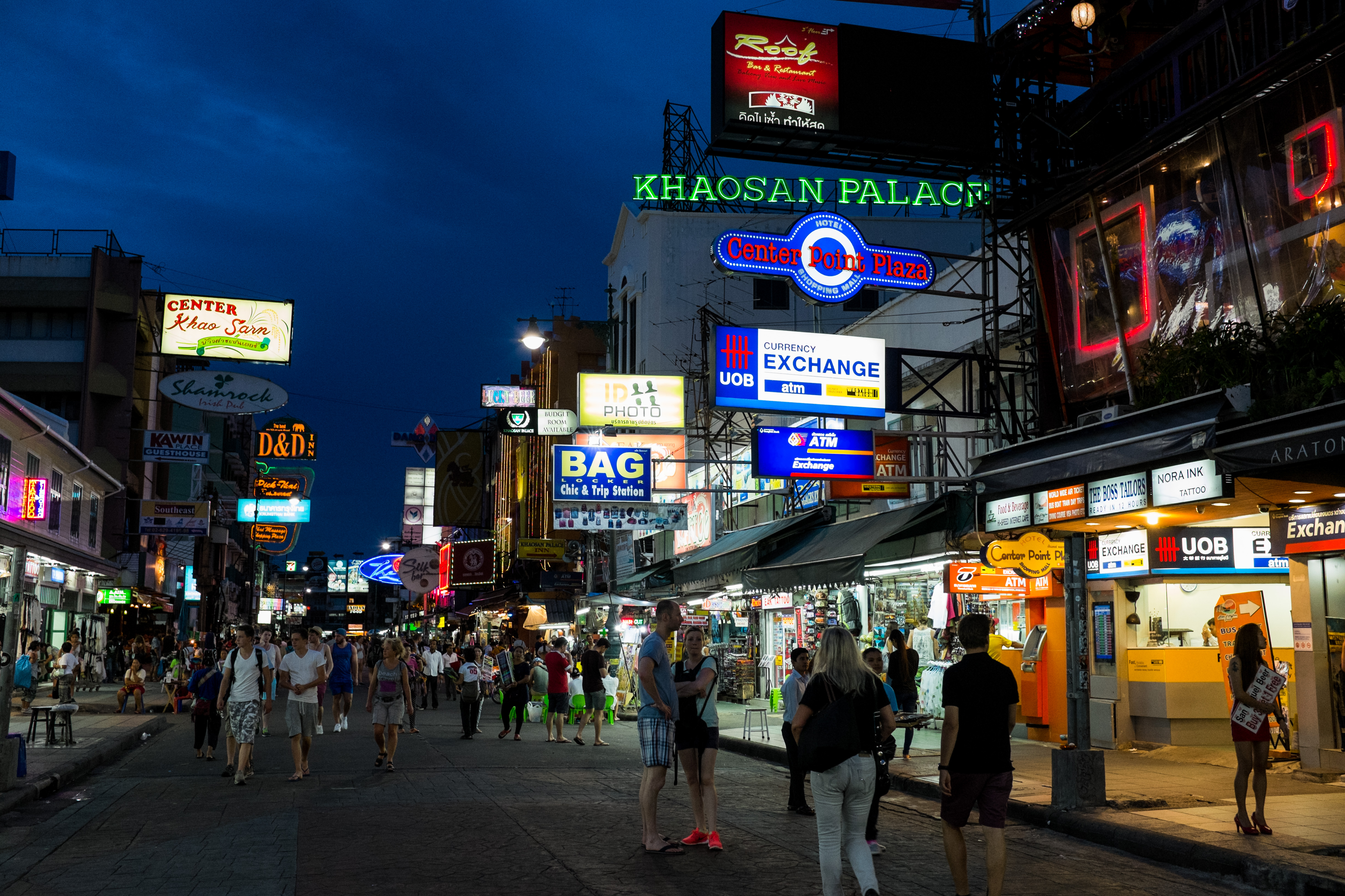 Bangkok. Kaoh San Road